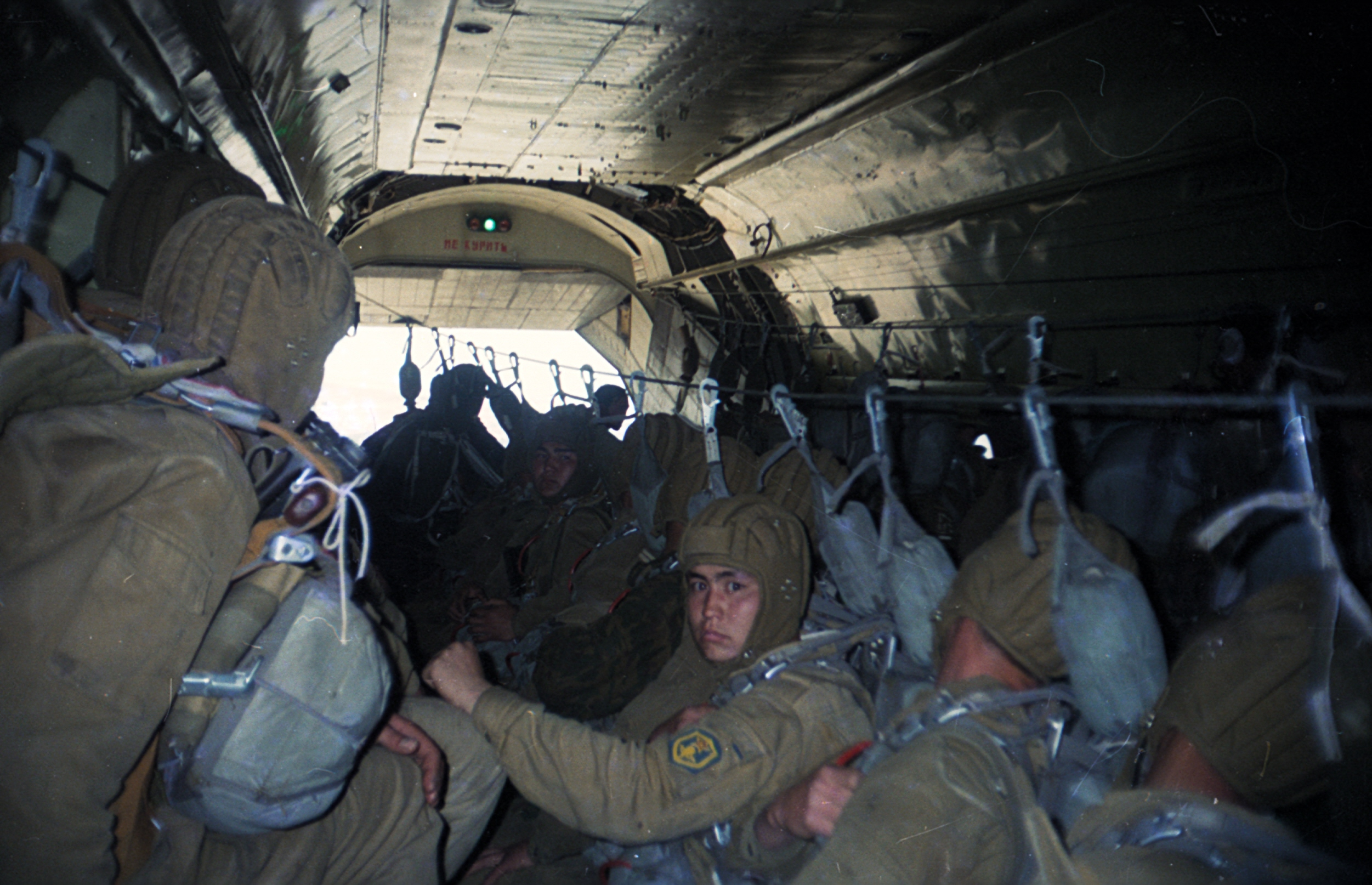 На снимке - в грузовой кабине самолёта Ан-12 бойцы 35-й десантно-штурмовой бригады Вооружённых Сил Казахстана готовятся к парашютному десантированию. Два средних ряда закреплены карабинами вытяжных парашютов за один трос. 15 мая 1996-го года в небе над городом Капчагай Алма-Атинской области.